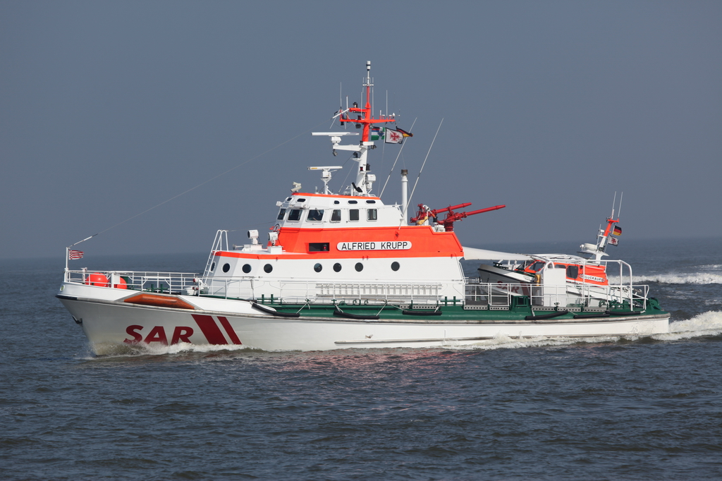 Alfried Krupp vor Eemshaven